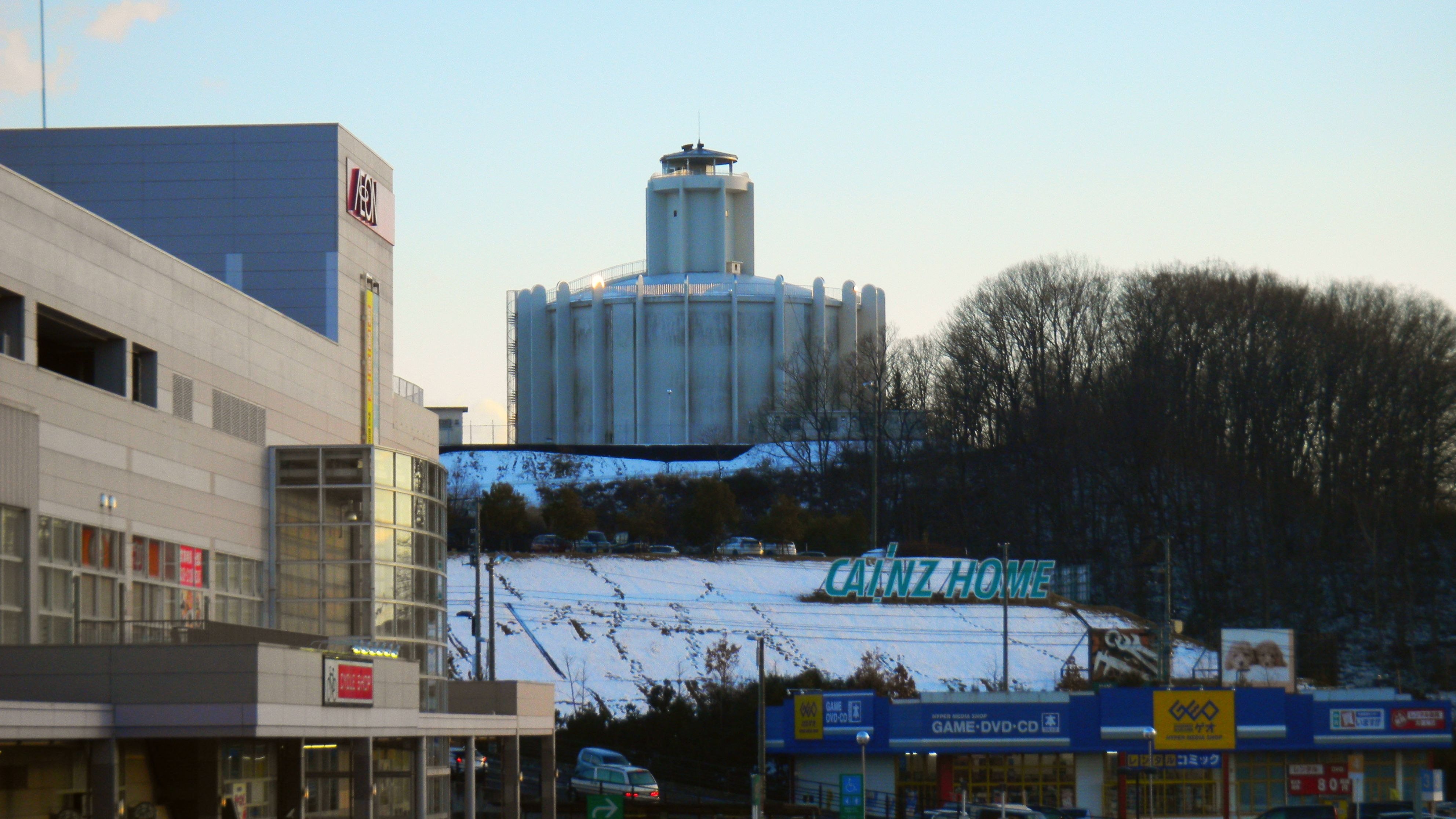 シンフォニータワー富谷市